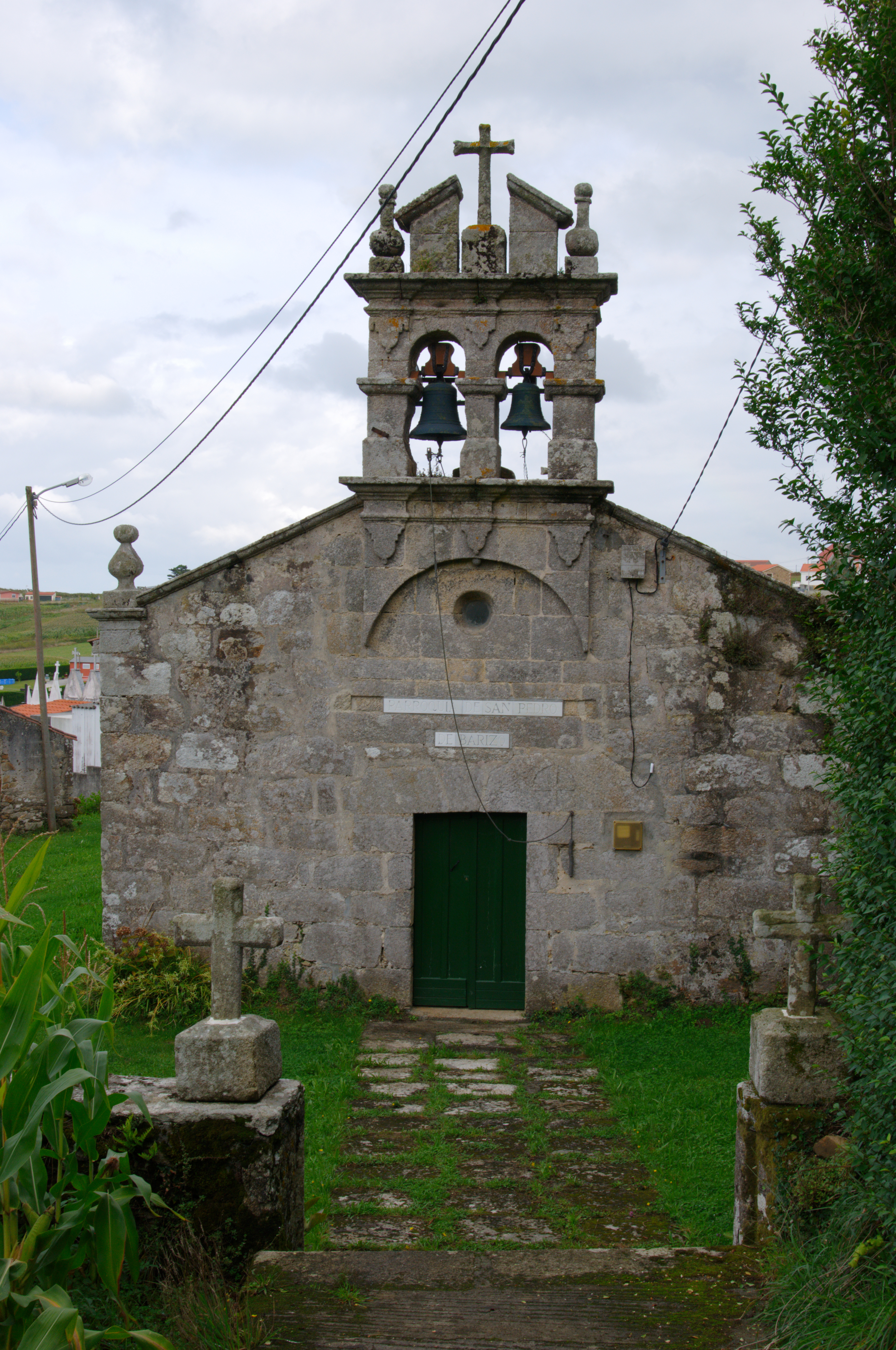 Barizo, iglesia parroquial de San Pedro